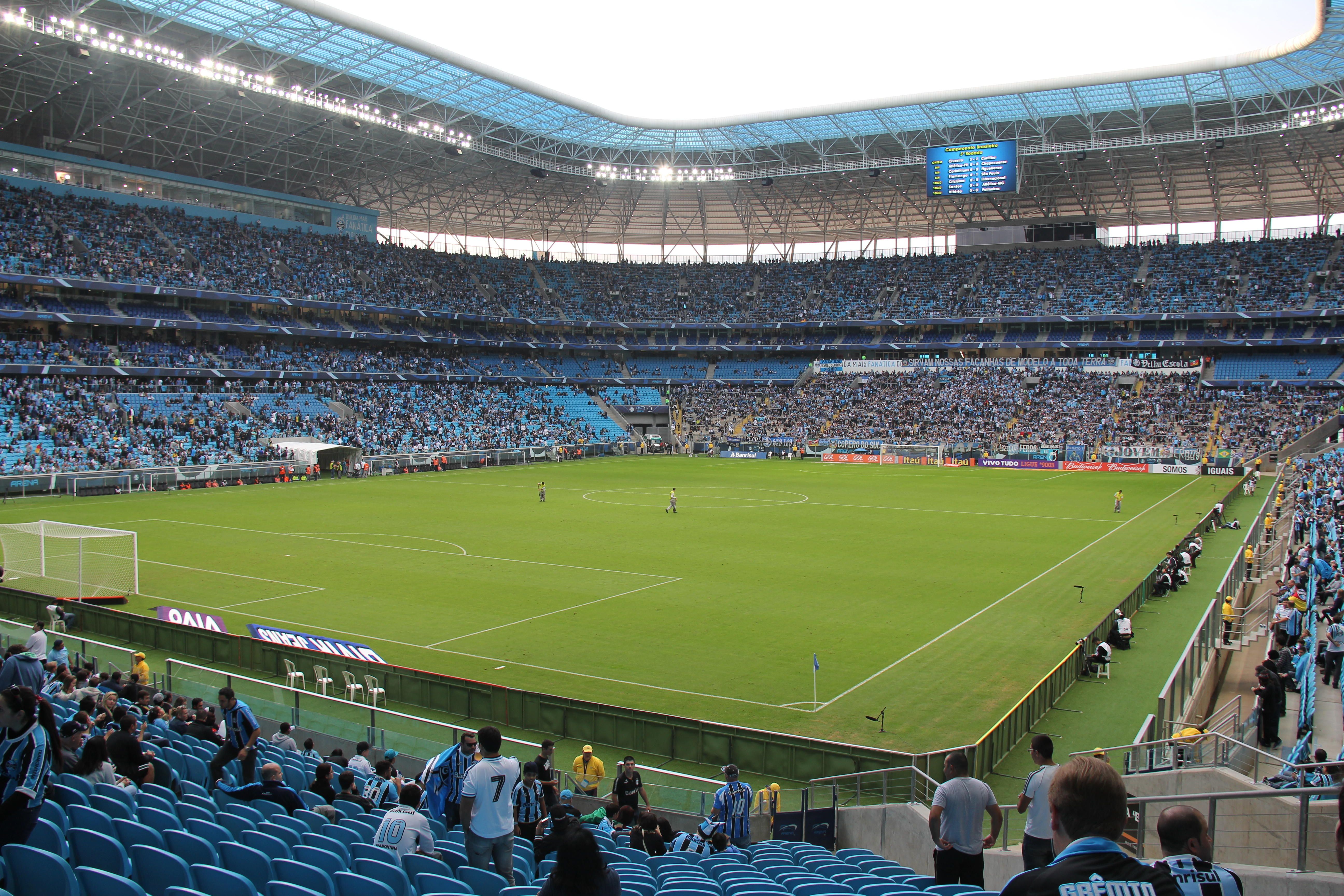 Arena do Grêmio, estádio multiuso localizado na cidade de Porto Alegre, Brasil. É a casa do Grêmio Foot-Ball Porto Alegrense.